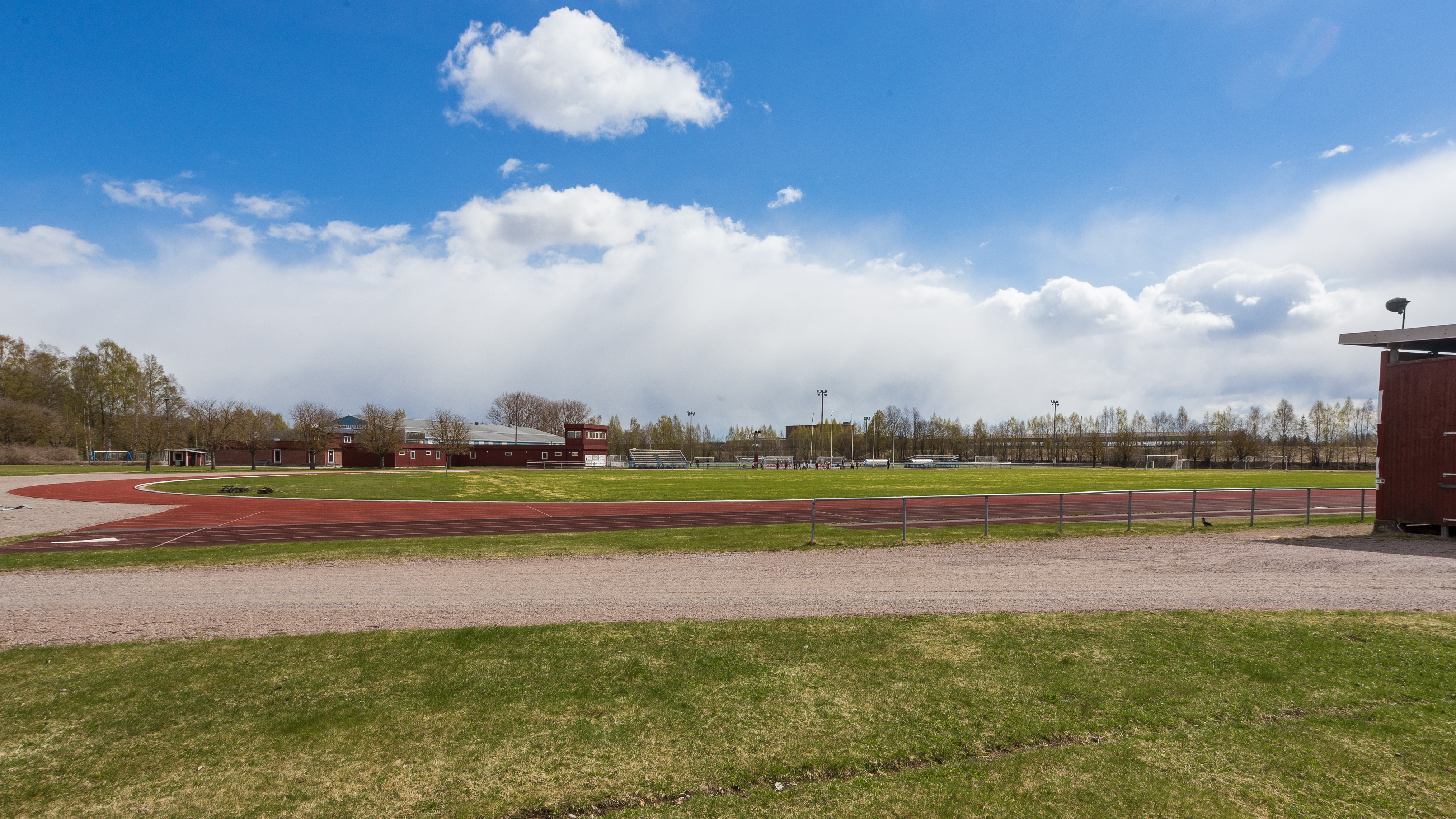 Avestavallen, Avesta, Dalarnas län, Sverige.